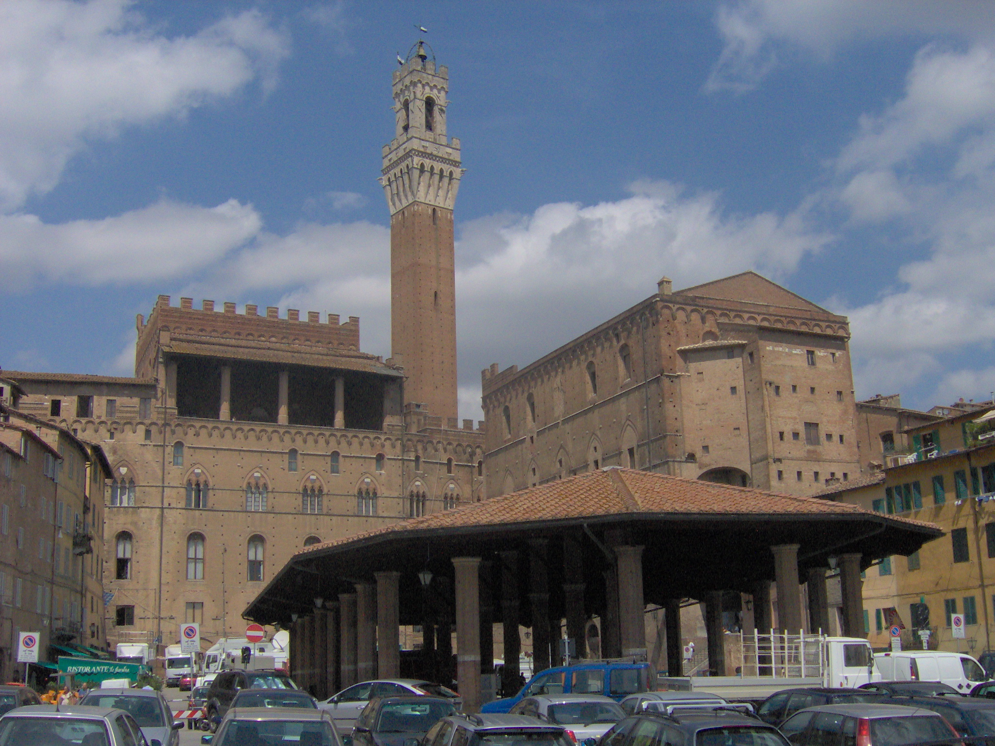 Image di Piazza del Mercato con il retro del Palazzo Pubblico, durante il Palio dell'Assunta (16/08/2006) - Siena.